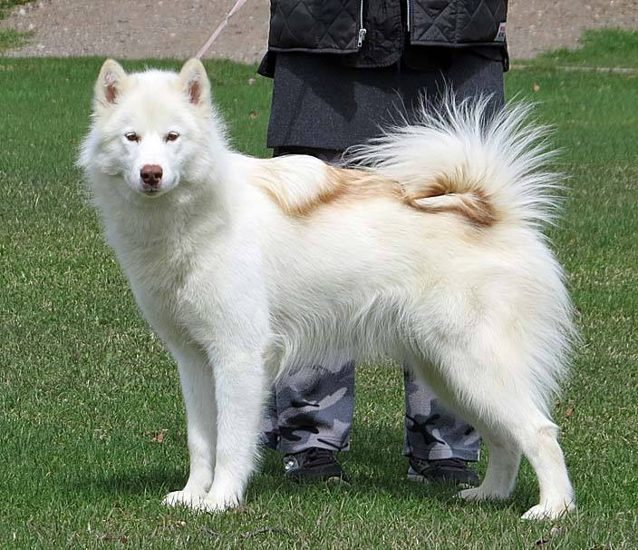 Perro de raza esquimal canadiense, también llamado "Qimmiq".